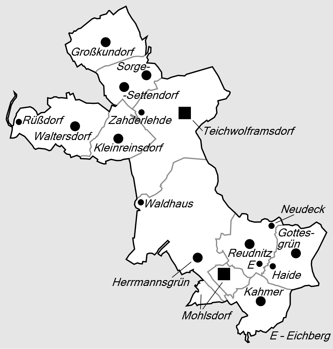 Gliederung der Gemeinde Mohlsdorf-Teichwolframsdorf